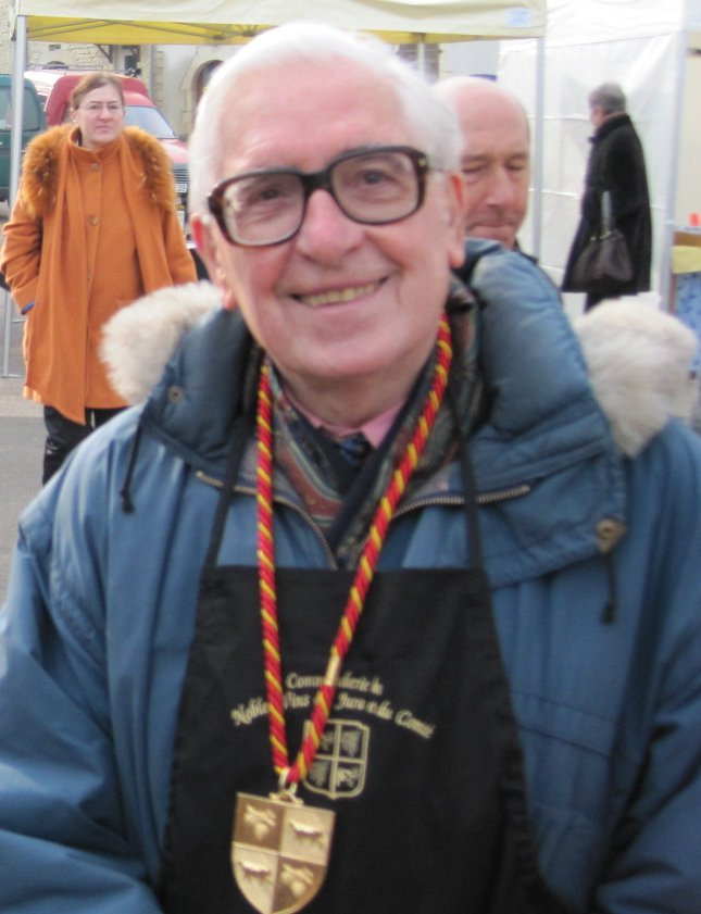 André Besson - Journaliste écrivain français de Franche Comté